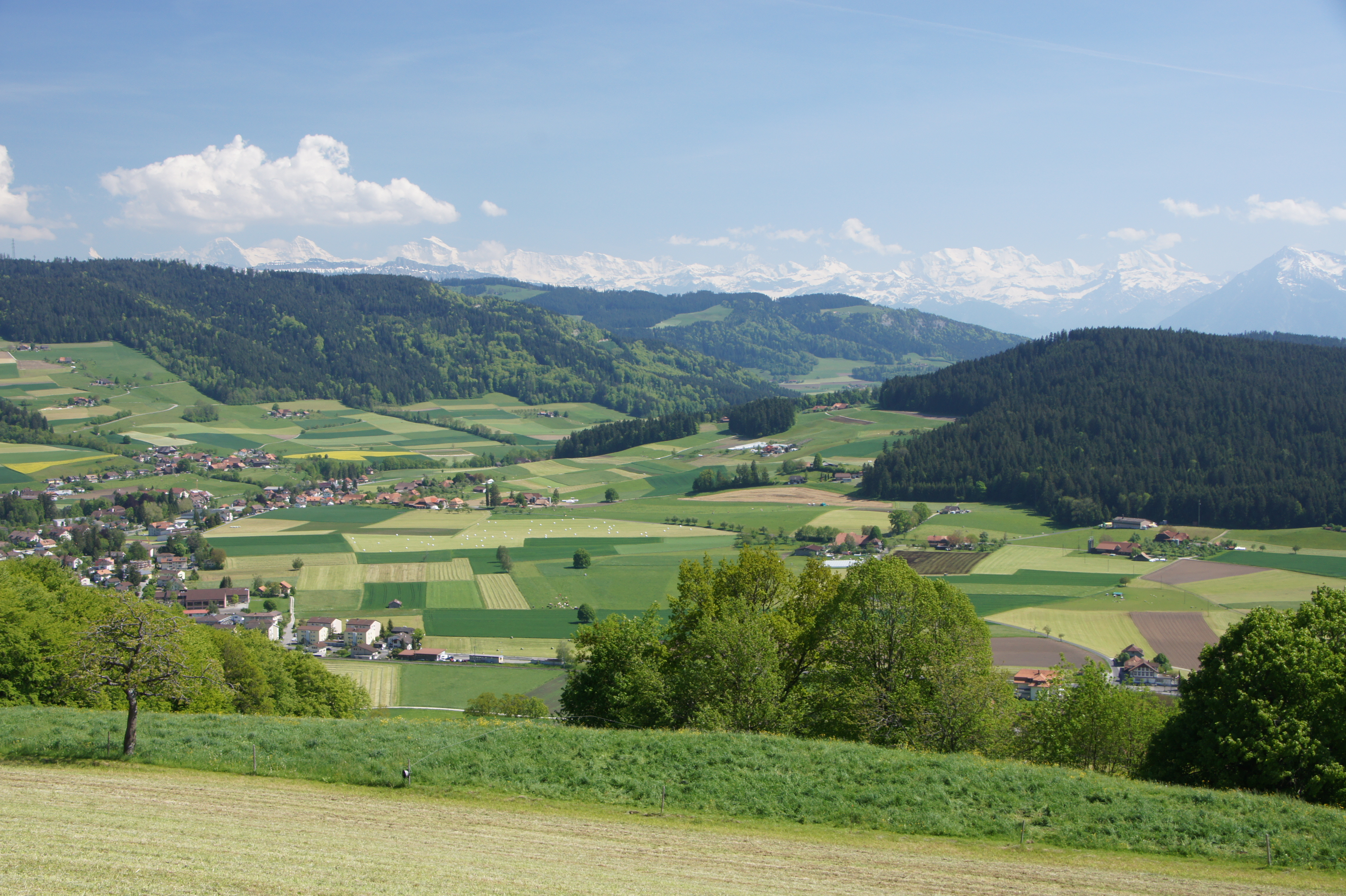 Landschaft bei Ballenbüel, Konolfingen, Kanton Bern, Schweiz